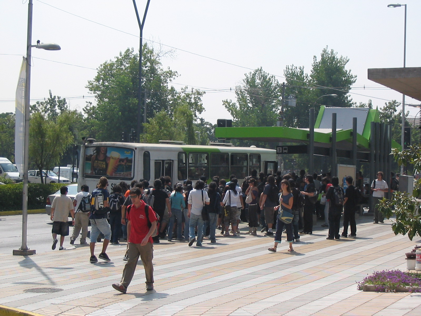 Esperando la "micro" del Transantiago en Bilbao con Tobalaba. Fotografia tomada el 16 de marzo de 2007.